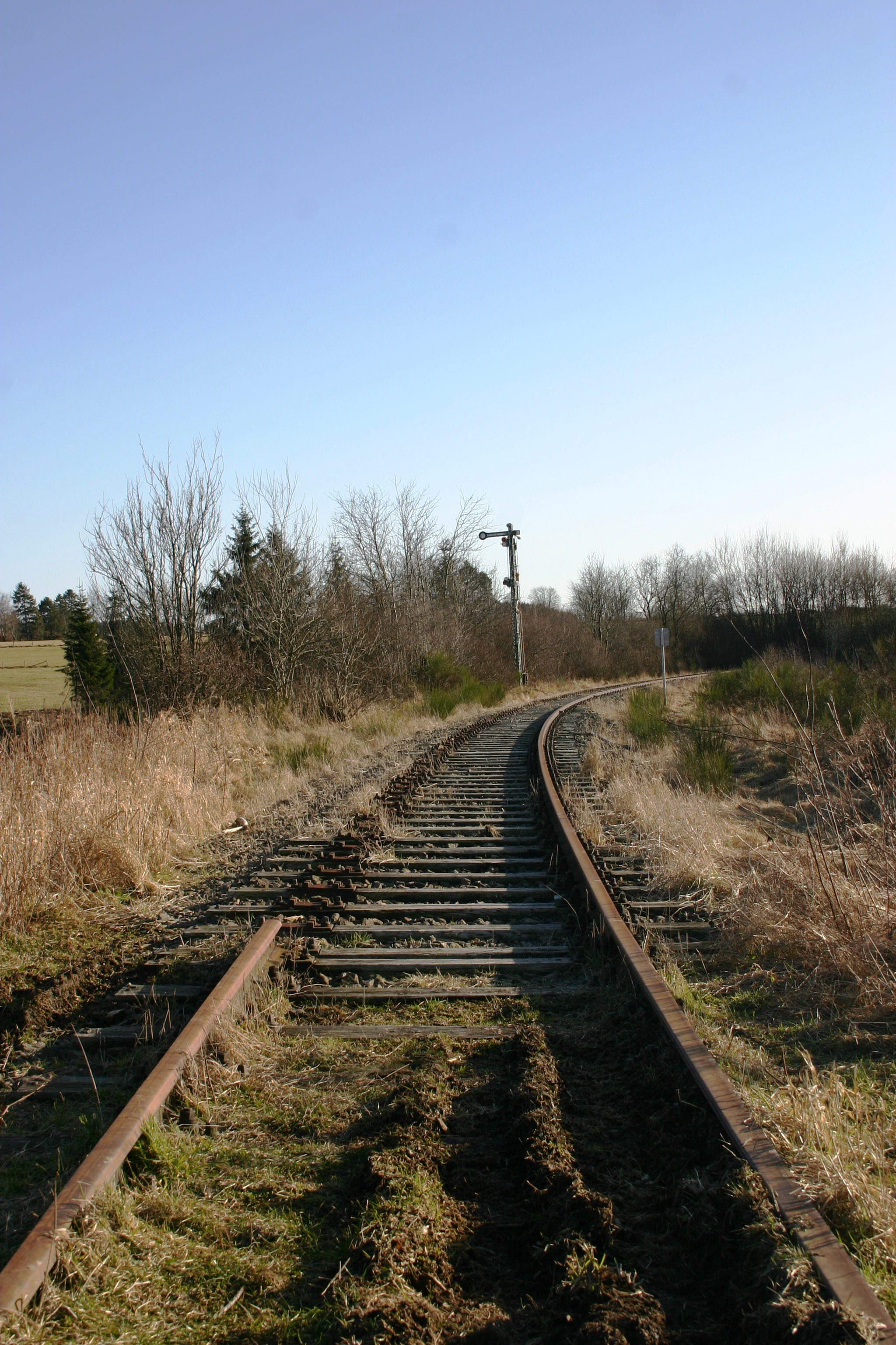 D'SNCB-Linn 48 zu Sourbrodt bei der Seeërei am Februar 2008.